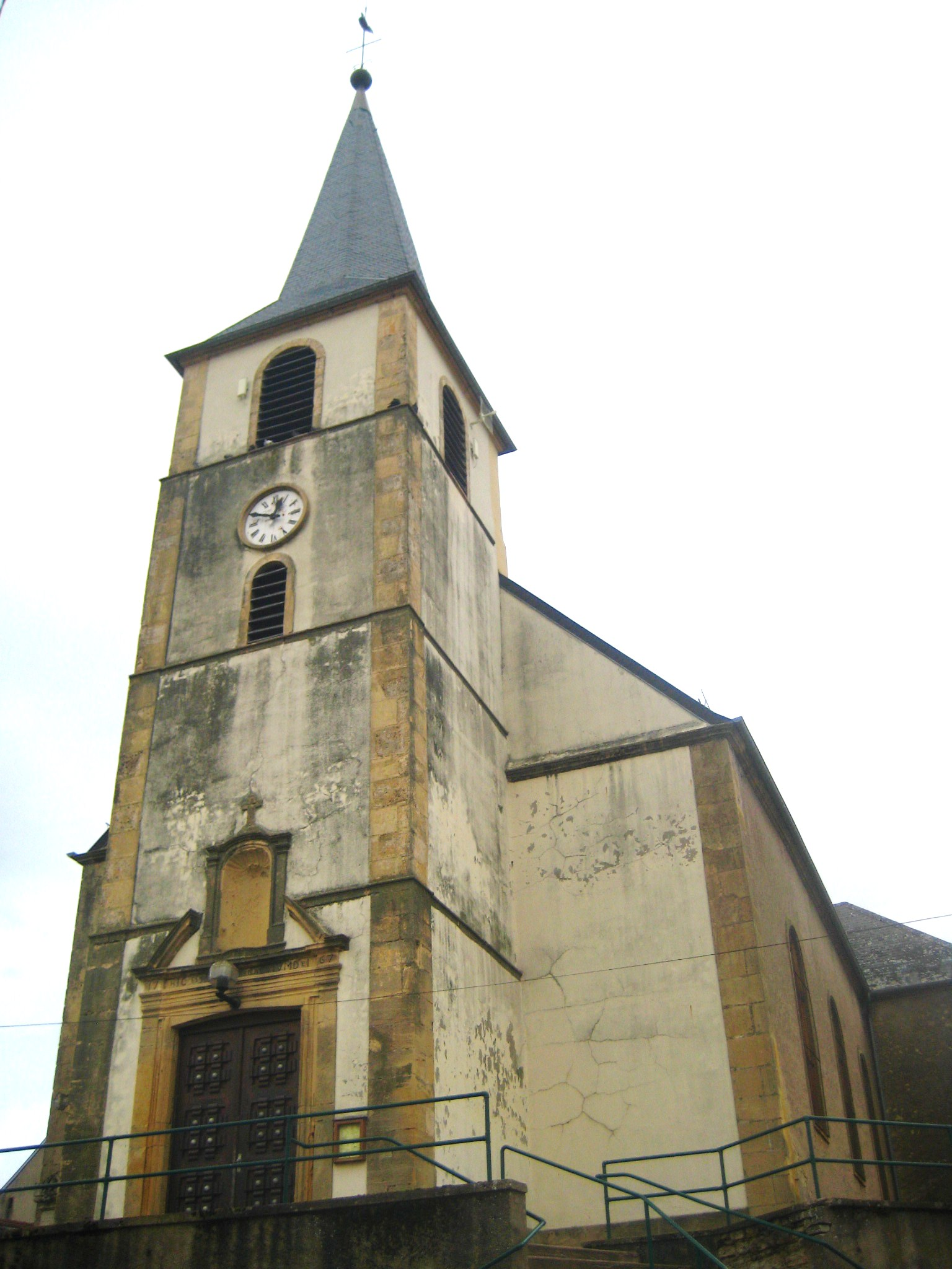 Eglise paroissiale Sainte-Marguerite Oudrenne